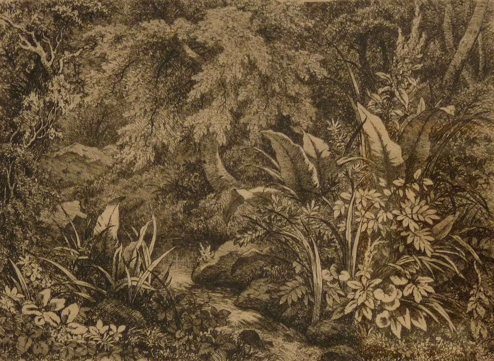 Ruisseau, d'Eugène Stanislas Alexandre Bléry (1805-1886), eau-forte, 1865, Cabinet des estampes et des dessins de Strasbourg.